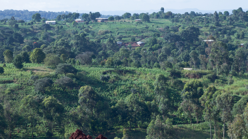 Paysage verdoyang de Bamougong